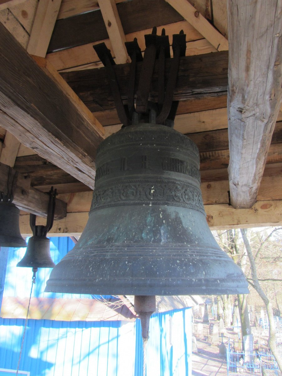 Зарэчча. Свята-Петра-Паўлаўская царква са званіцай